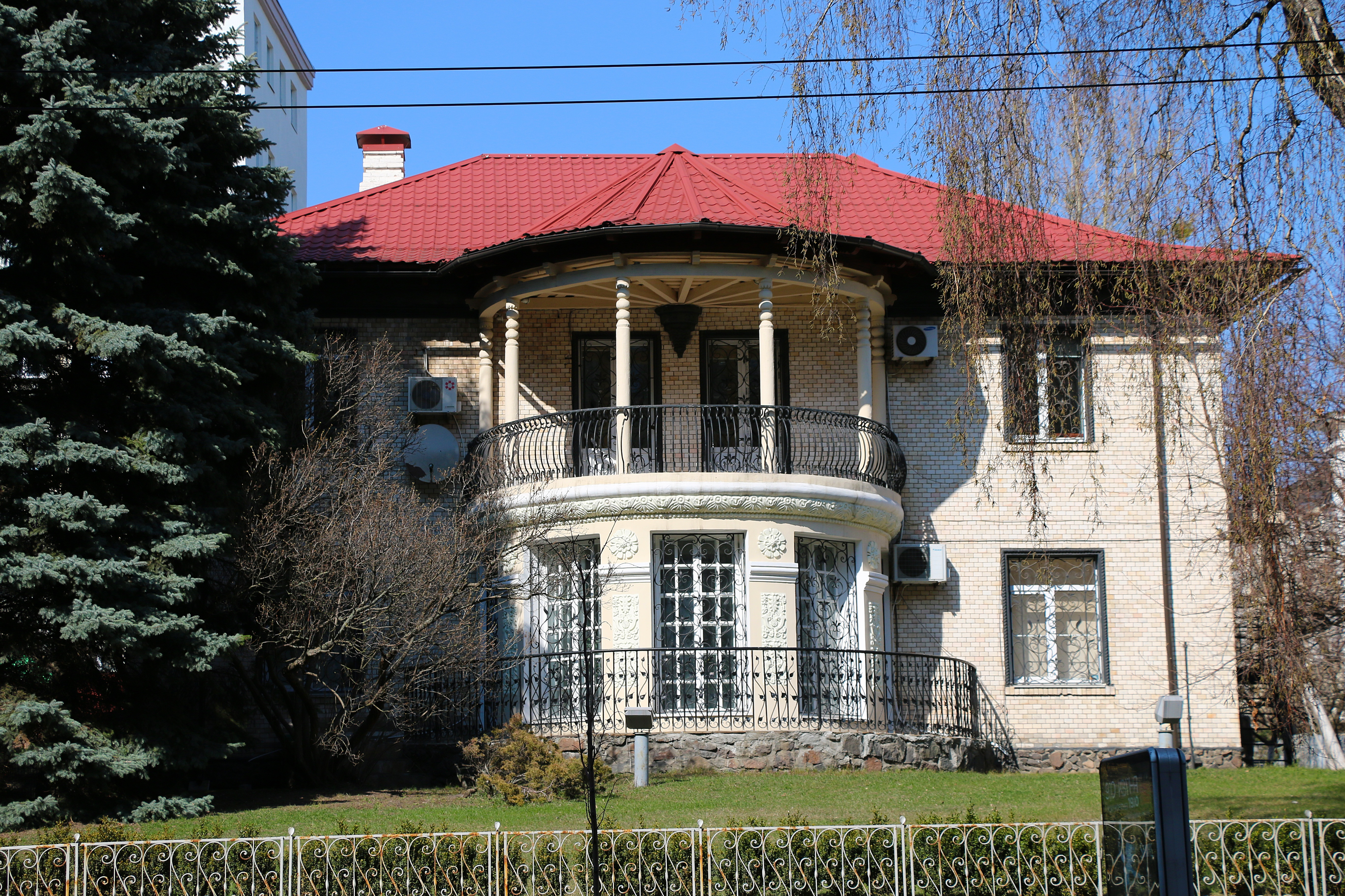 Особняк, в якому проживали Василевська В. І. та Корнійчук О. Є. — письменники, Київ, Січових Стрільців вул., 46